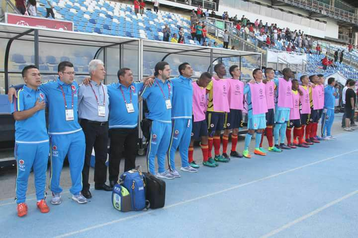 Suramericano